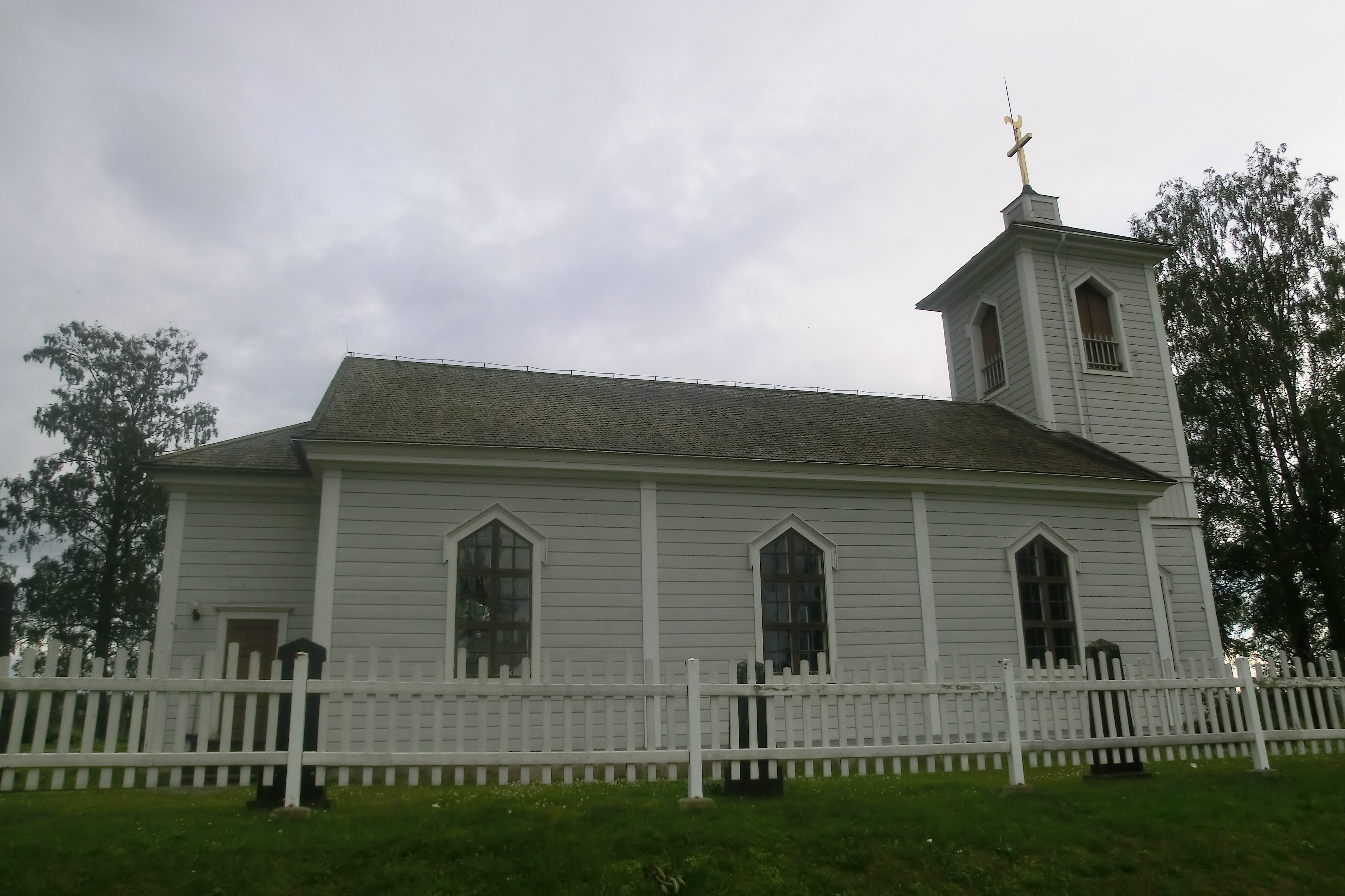 Nyhems kyrka